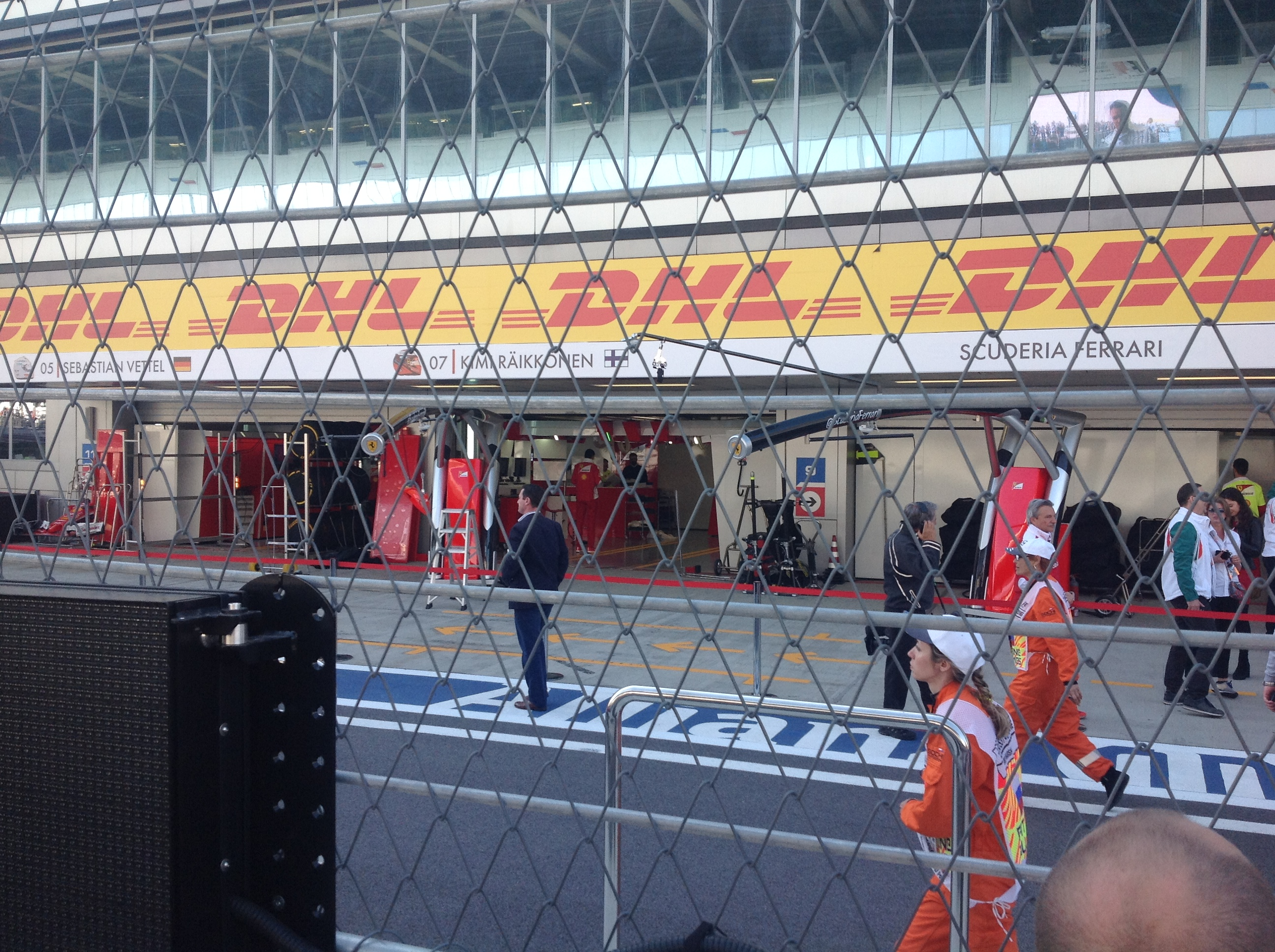 Боксы Феррари на Гран-при России в Сочи